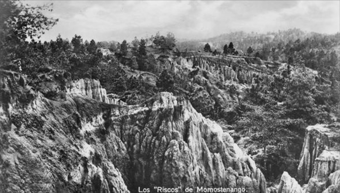 Riscos de Momostanango en 1920.